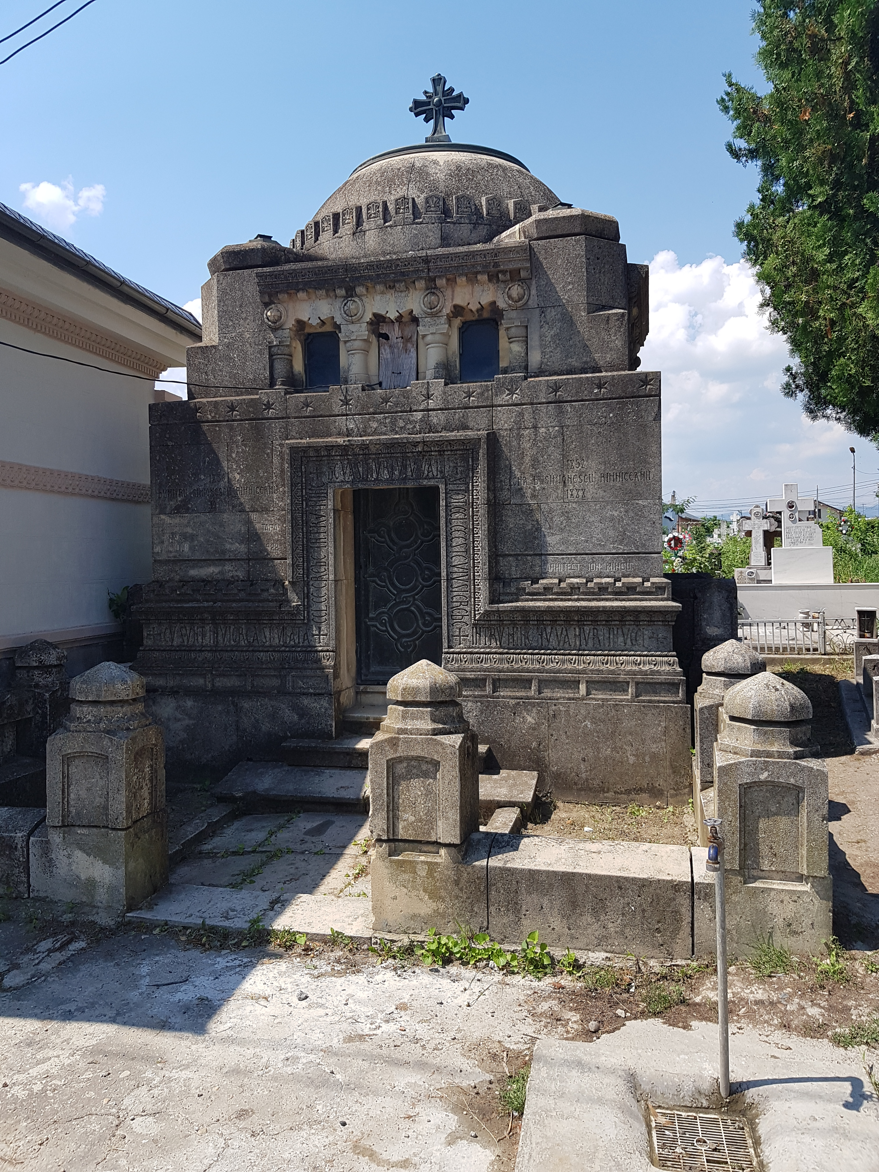 Cavoul Simionescu-Râmniceanu